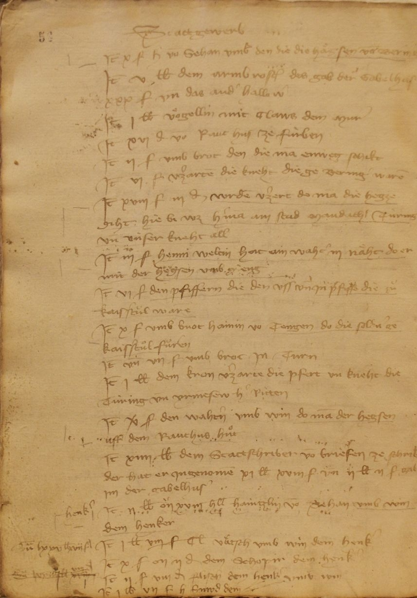 Eintrag über einen Hexenbrand in der Stadtrechnung von Schaffhausen 1402/03, Stadtarchiv Schaffhausen A II 05.01 Bd. 3, S. 56